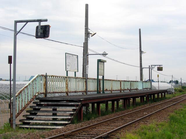 中徳富駅駅舎 撮影場所 中徳富駅駅そば踏切より。 撮影者によるGFDLリリース